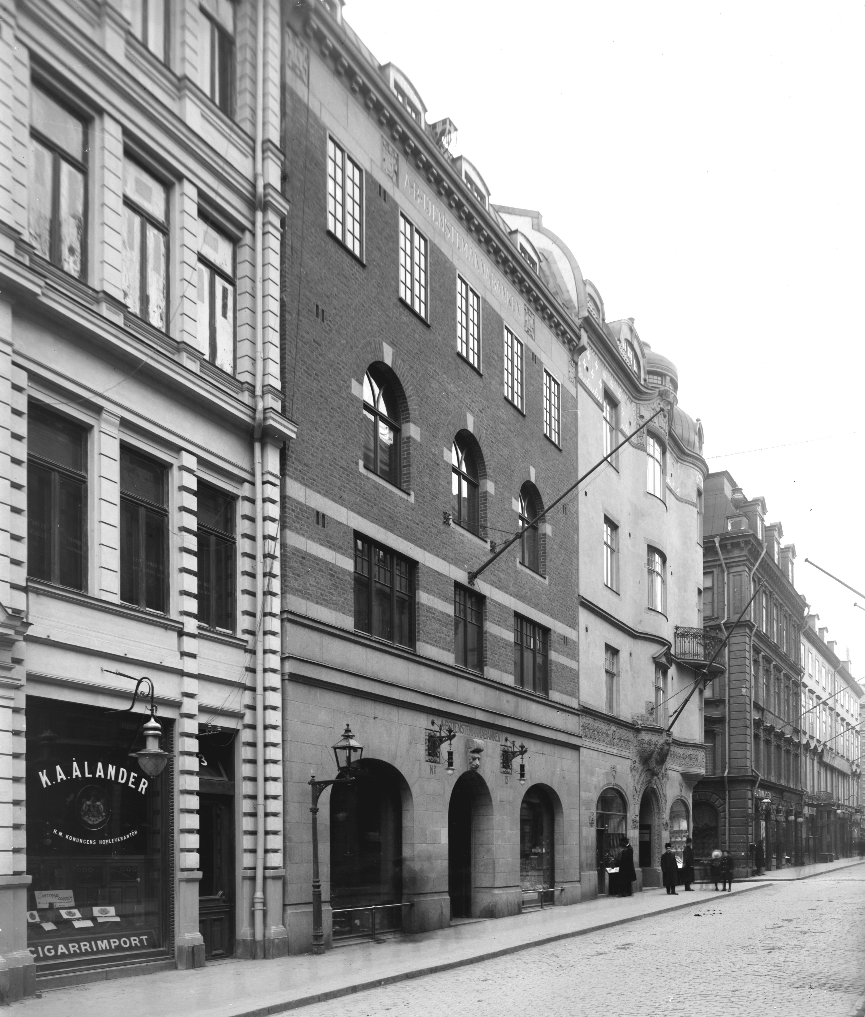 Drottninggatan 13 - 17 mot norr i kvarteret Loen.